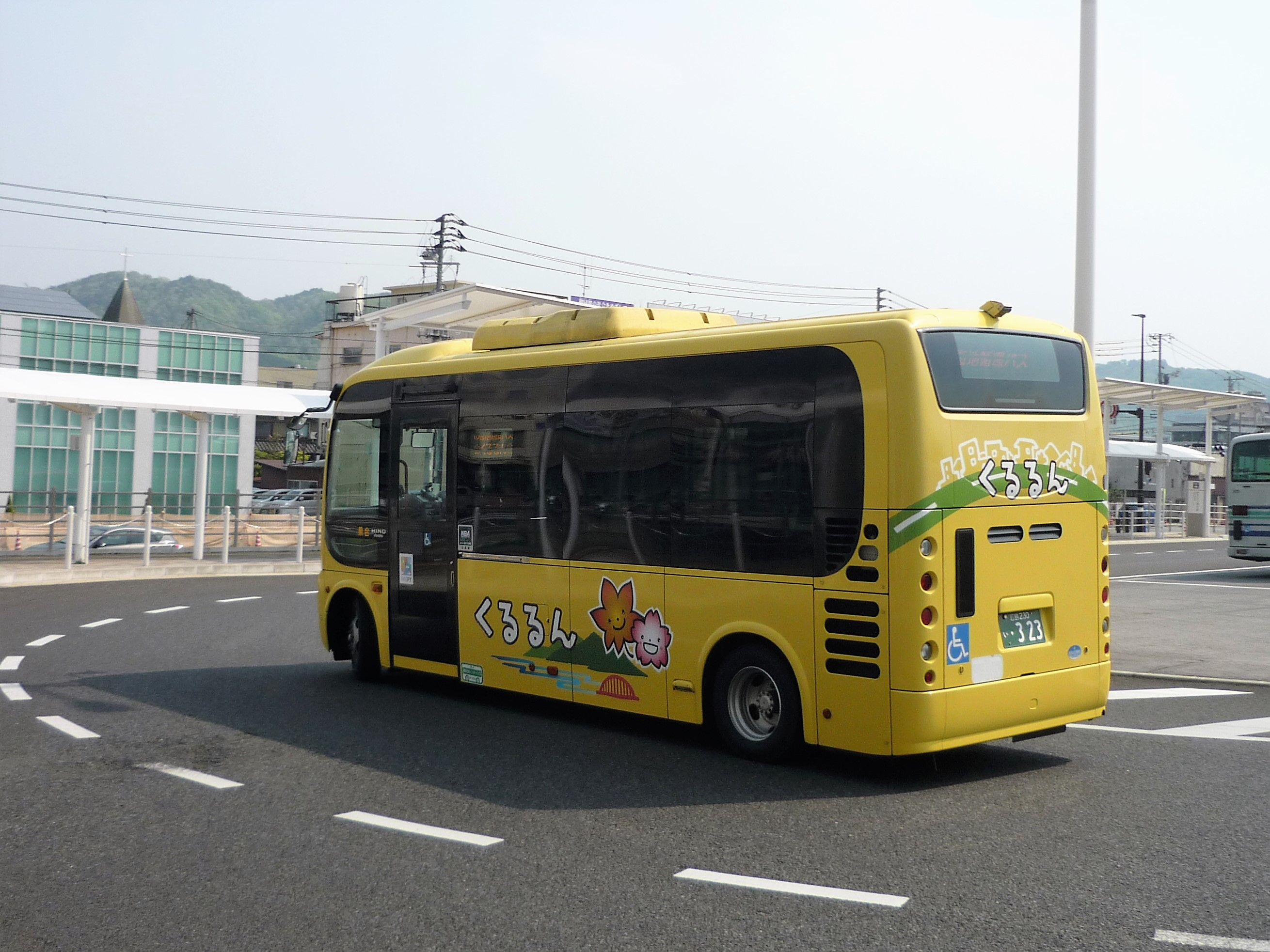 三次市の市街地循環バス「くるるん」（備北バスが運行）